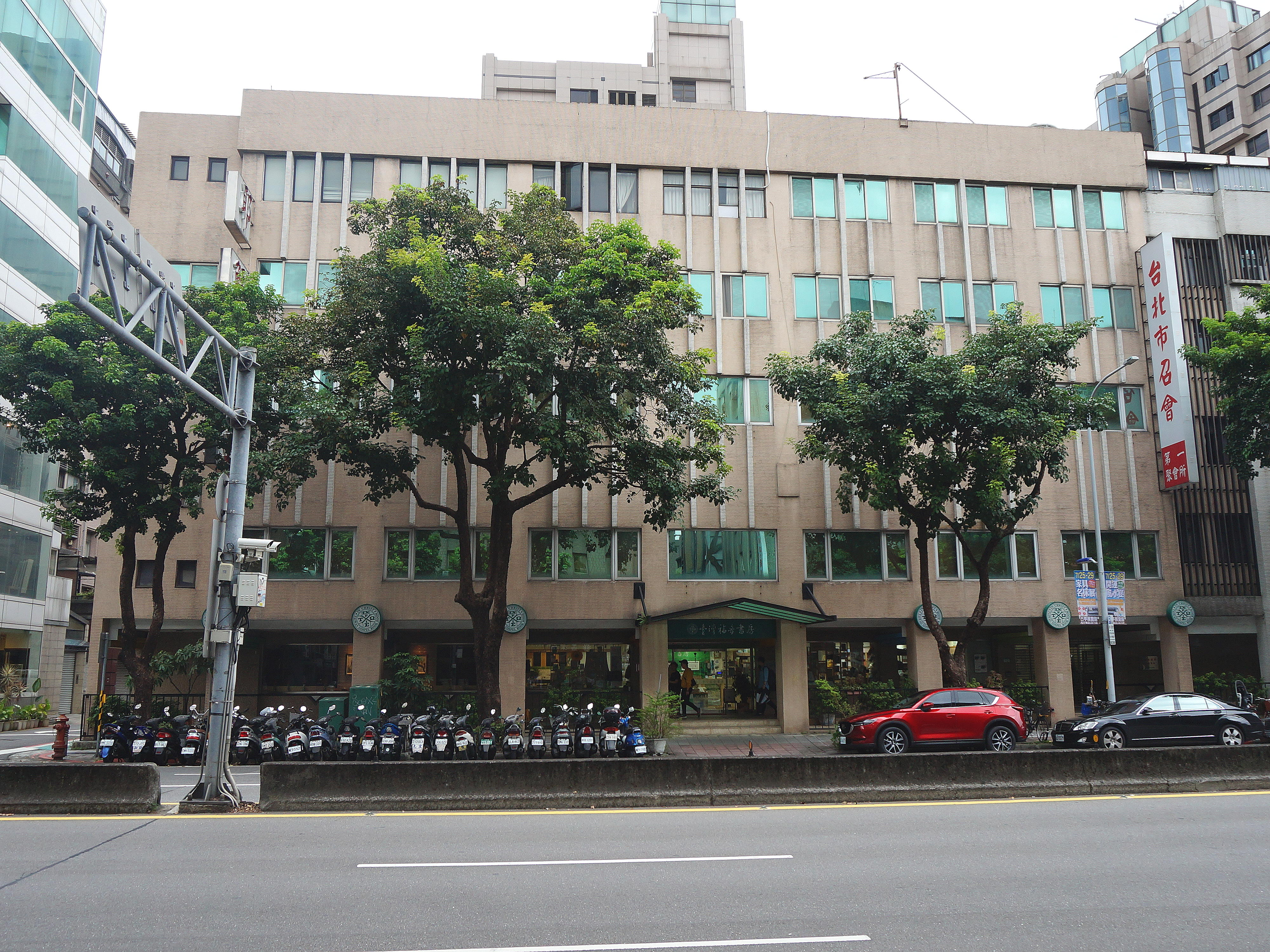 臺北市召會第一聚會所，地址：臺北市中正區金山南路一段72號。臺灣福音書房第一門市位於一樓。